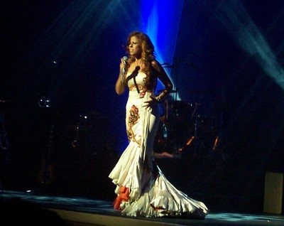 Actuación en el Teatro la Velada, de la Linea de la Concepción,Cádiz.